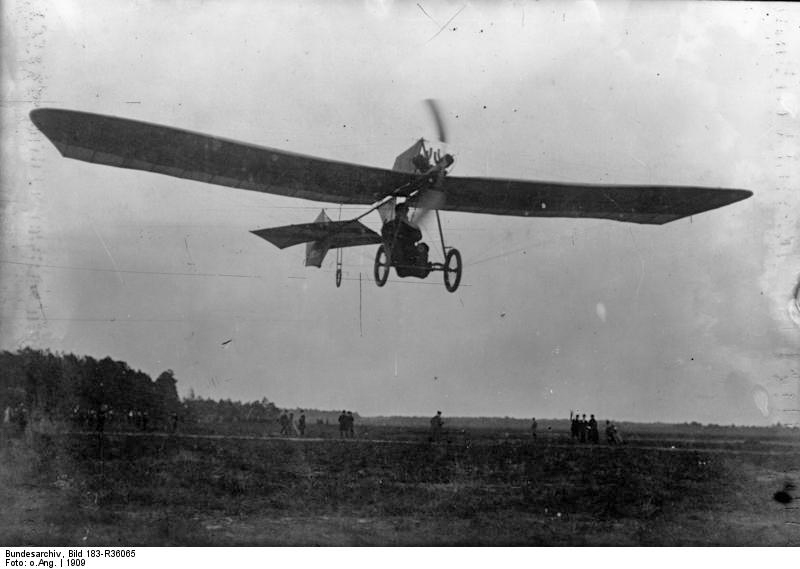 Hans Grade Zentralbild Hans Grade fliegt auf dem Marsfeld bei Berlin (1909) 17203-09 Abgebildete Personen: Grade, Hans: Flugpionier, Deutschland (GND 119051222)